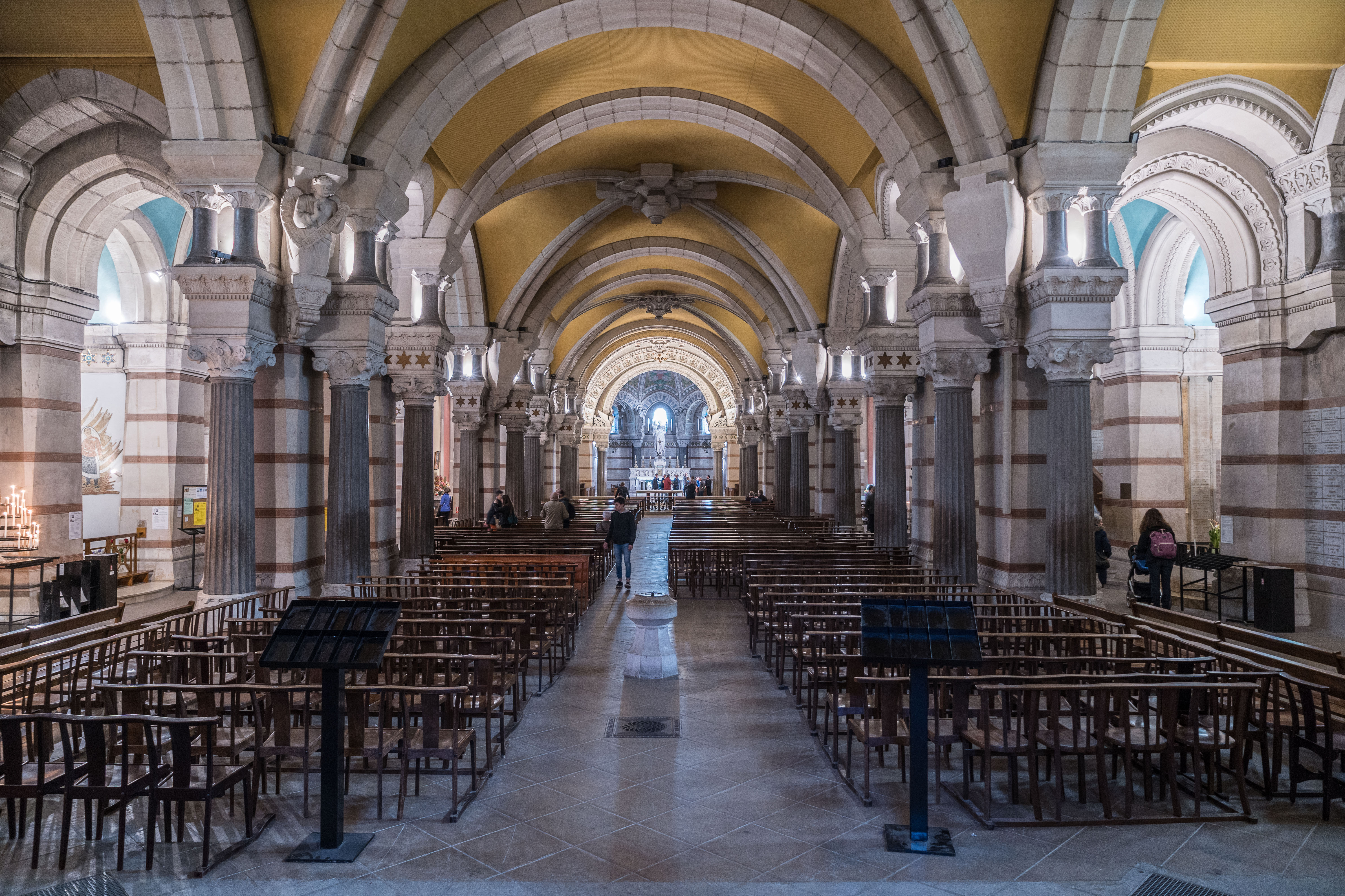 Lyon - Basilique de Fourvière - Eglise Basse - Vue générale